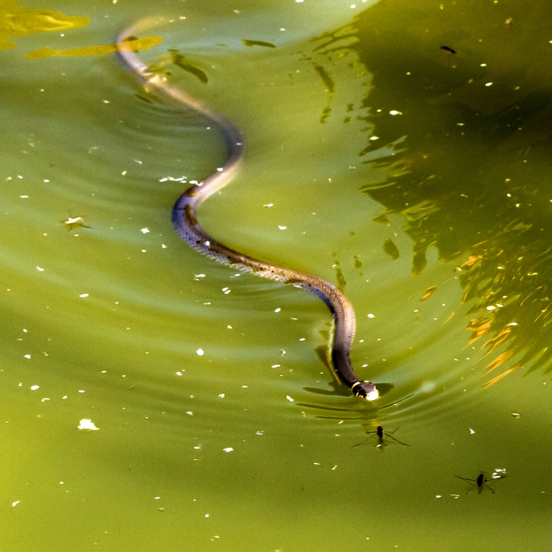 Sachsen, Garten: Ringelnatter